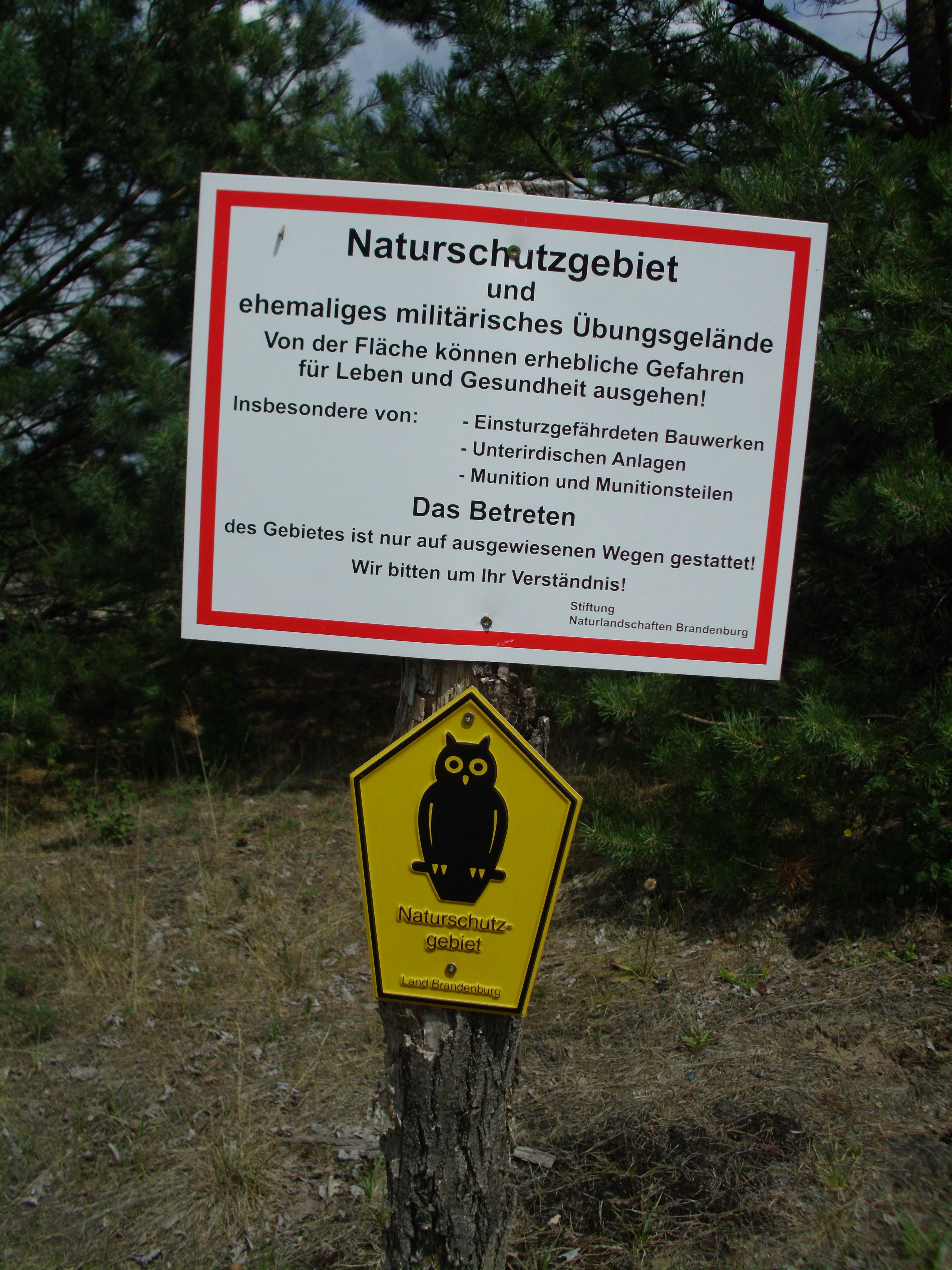 Warnschild Munitionsbelastung Lieberoser Heide, Lieberose, Brandenburg, Deutschland